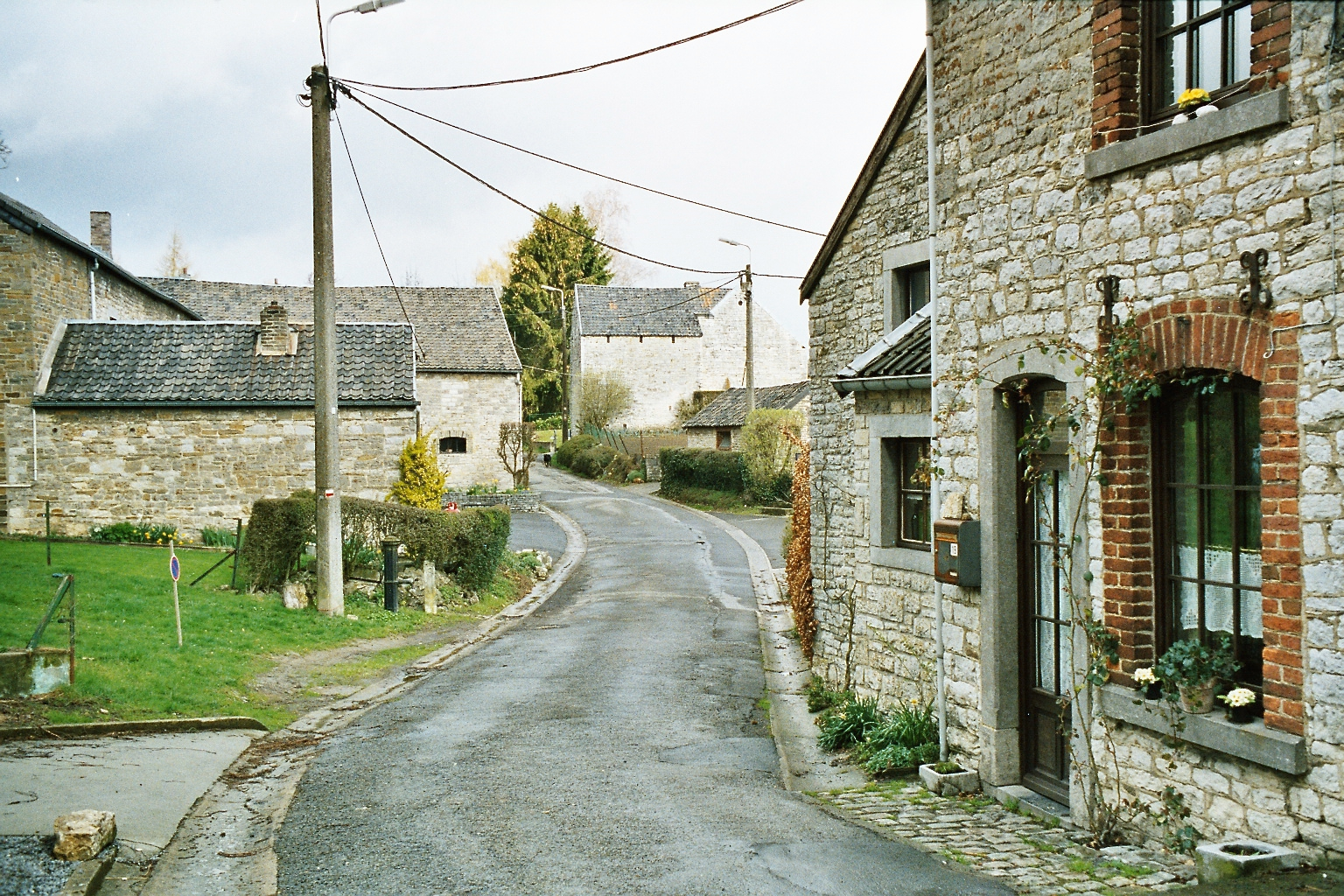 Belgique, Belgium, Province de Liège, Commune d' Anthisnes, village de Berleur, habitat typique du Condroz